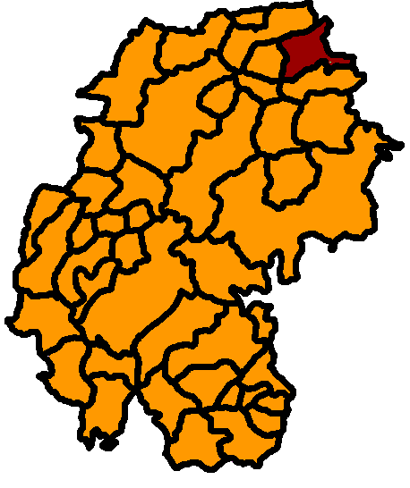 Elleben hervorgehoben, Ilm-Kreis